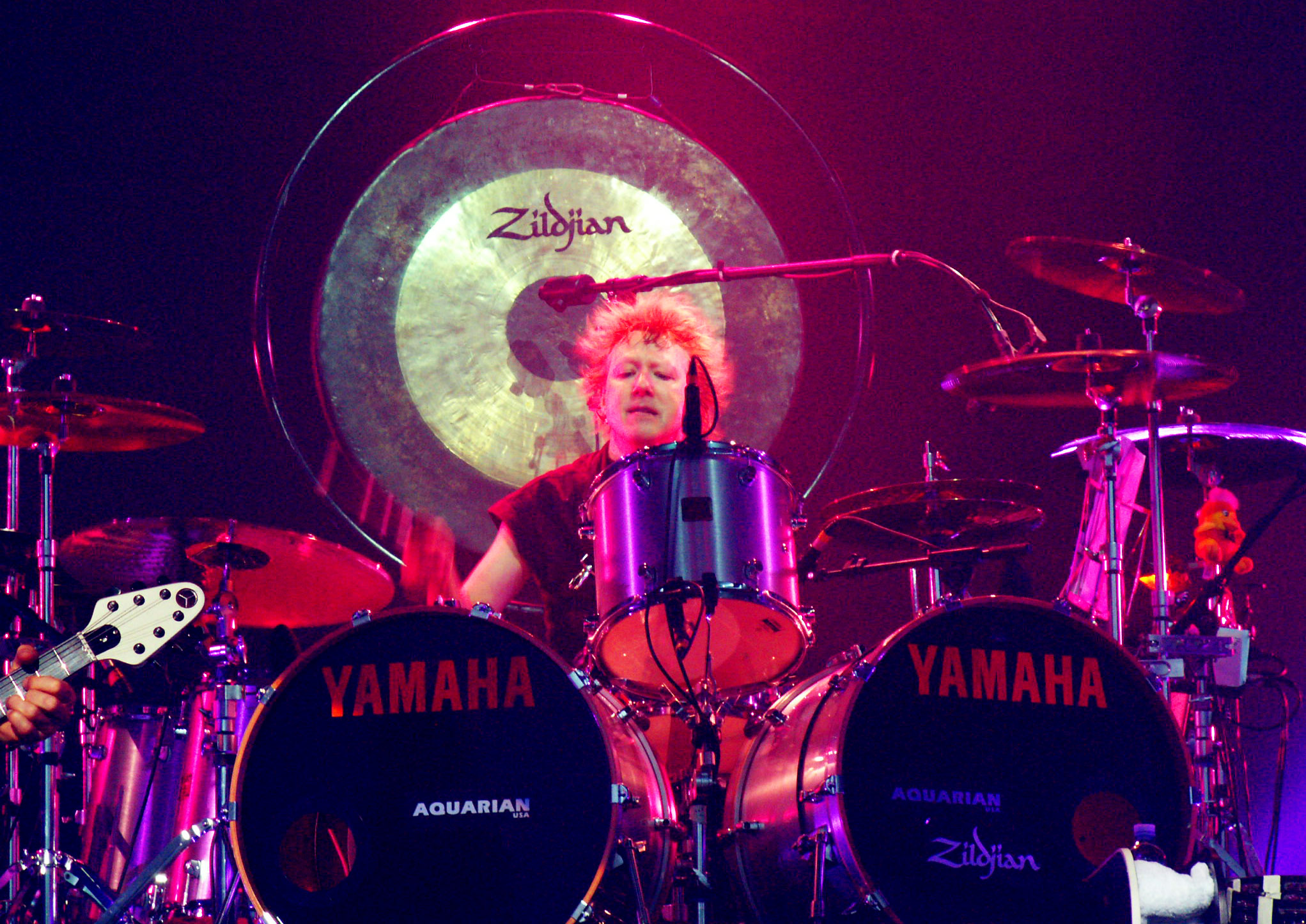 James Kottak au Zénith de Nantes en 2007